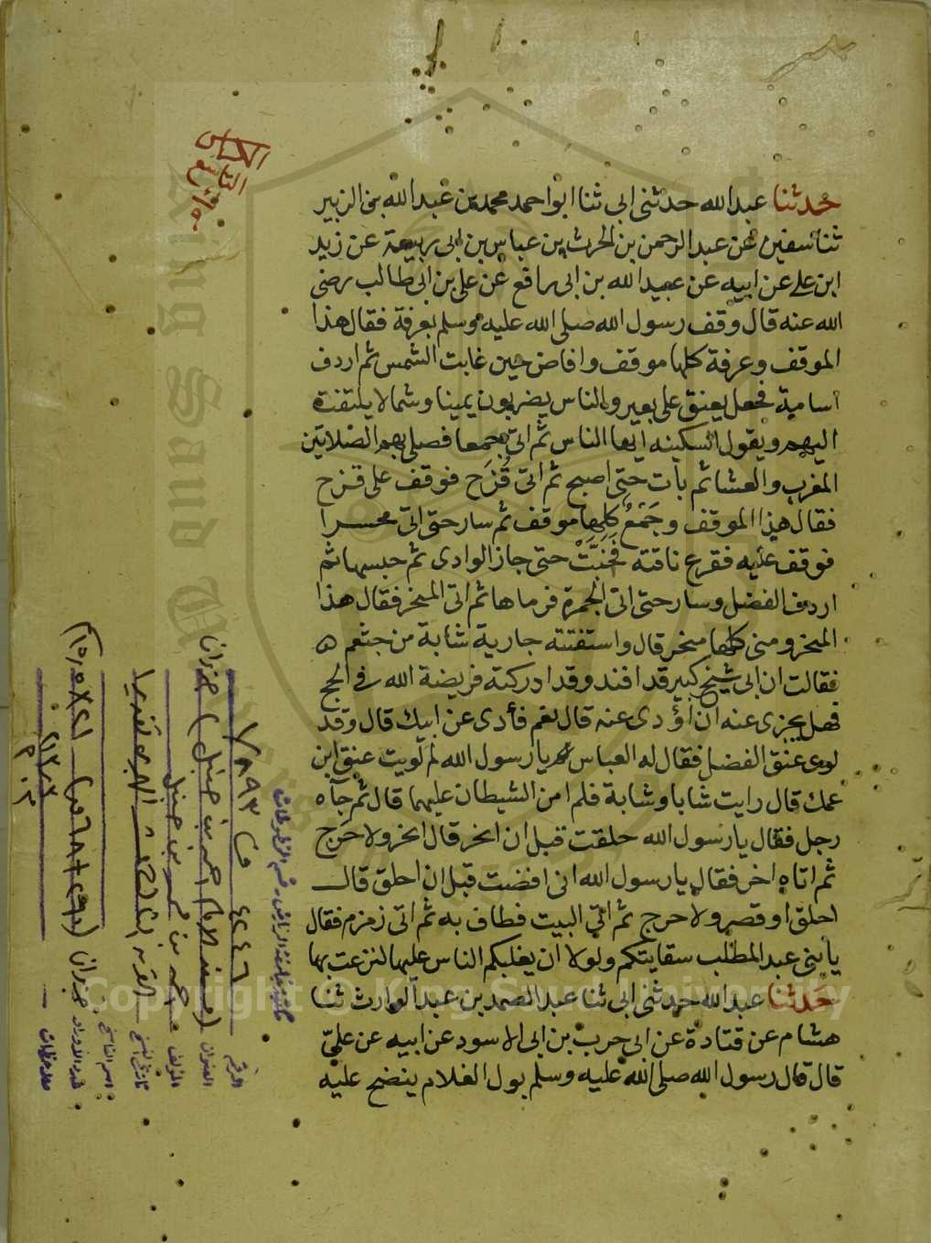 الصفحة الأولى من مخطوطة مسند الإمام أحمد المحفوظة في جامعة الملك سعود تحت رقم 213.3 / م.أ، الرقم العام: 4346، تاريخ النسخ: القرن الثالث عشر الهجري